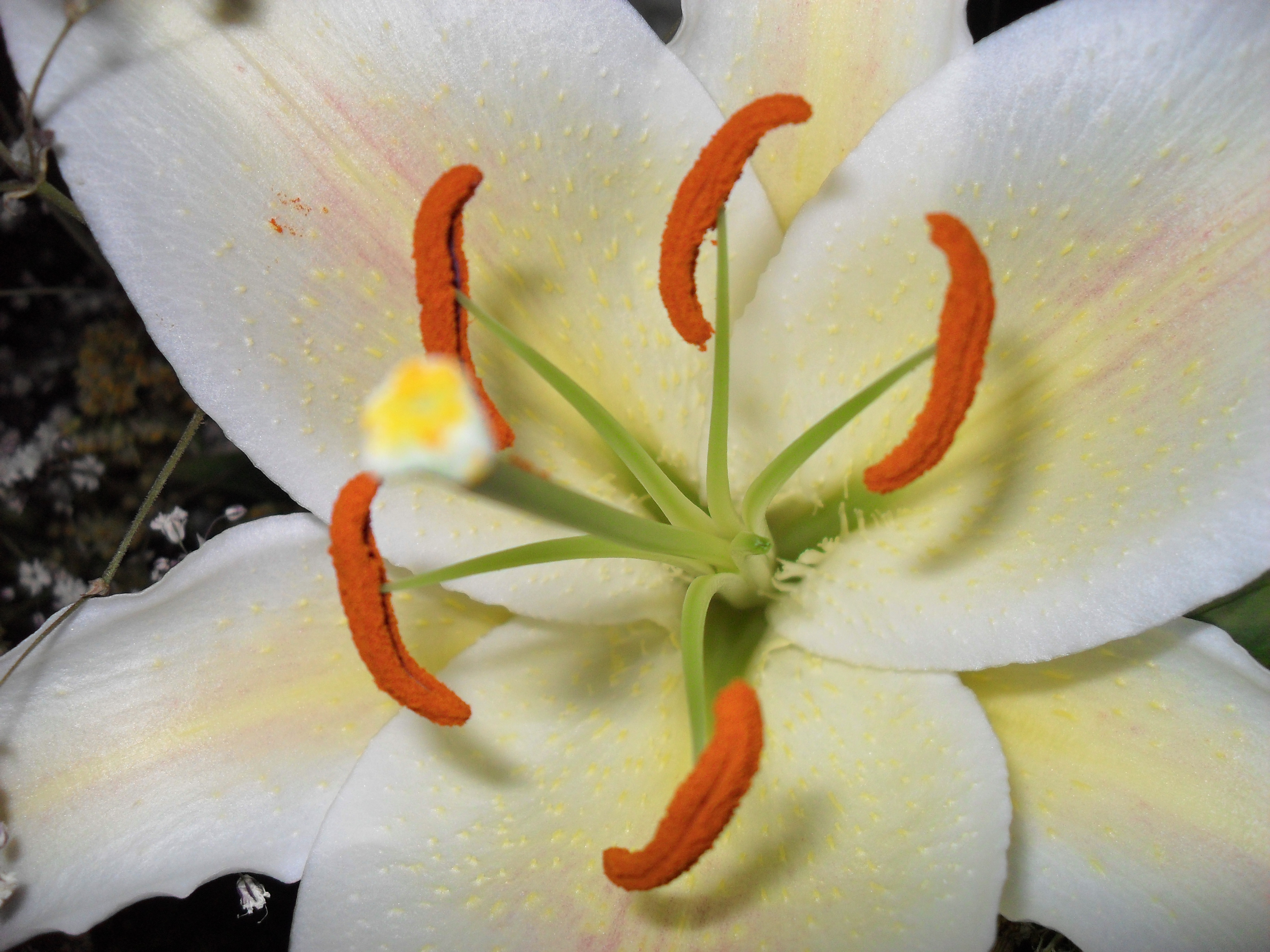 Beyaz bir zambağın polenleri.